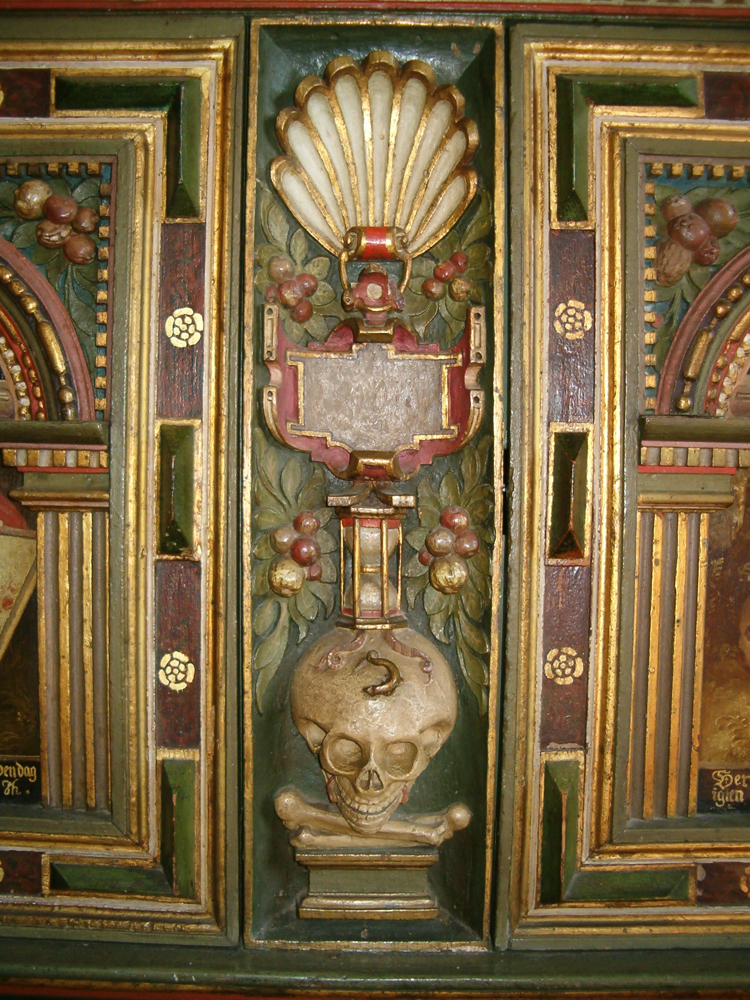 Detalje af den lærde Holgers skab på Rosenholm Slot, Djursland